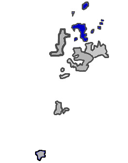 台灣省澎湖縣白沙鄉 KaurJmeb於2005年2月8日為編輯澎湖縣zh:白沙鄉所繪